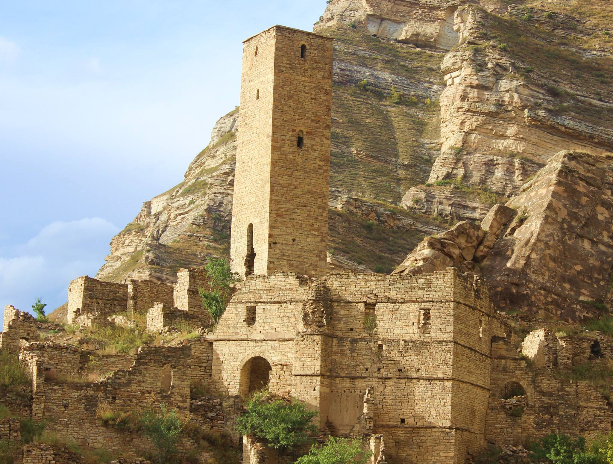 Аул Старый Кахиб в Дагестане